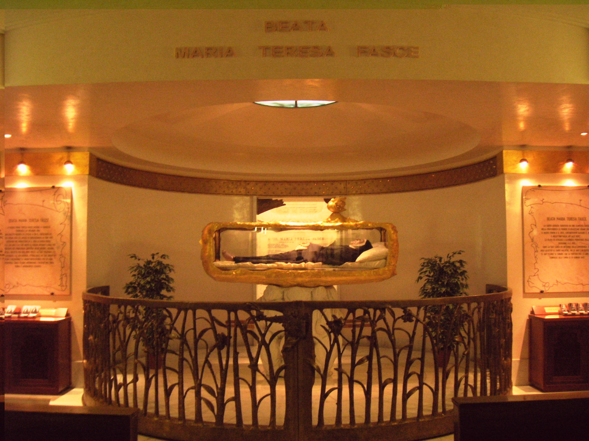 Basilica inferiore